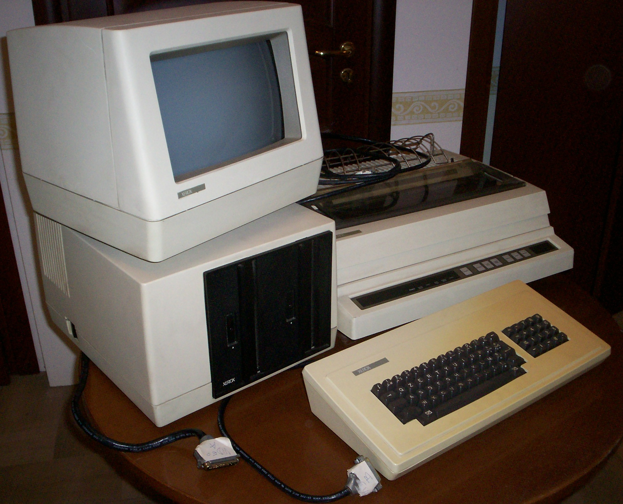 L'immagine, da me scattata, ritrae lo Xerox 820 che è appartenuto a me. Questa è una delle foto che feci in occasione della vendita.